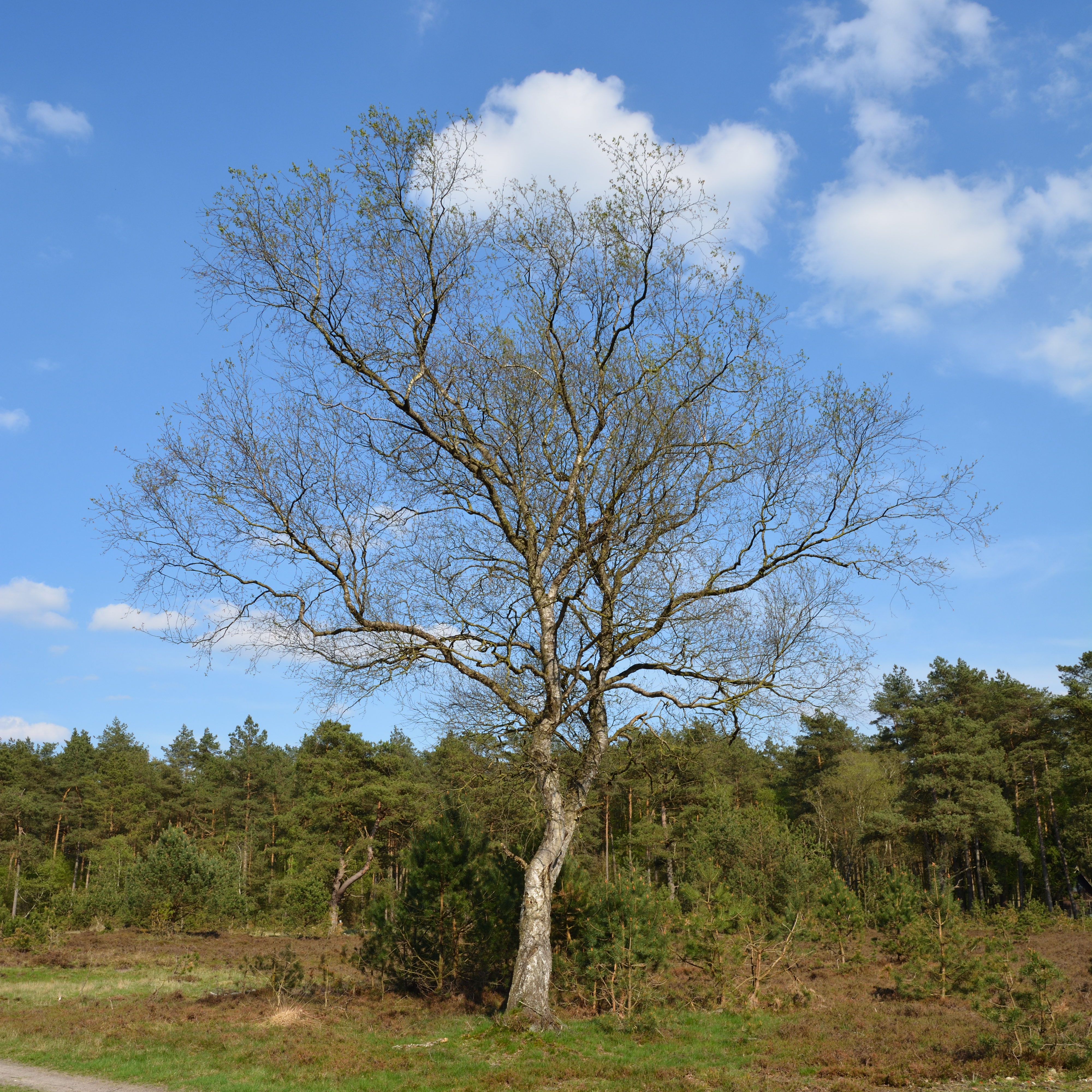 Impressionen vom Landschaftsschutzgebiet "Sandergebiet westlich von Brammerau" in Brammer.